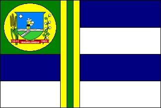 bandeira maurilandia